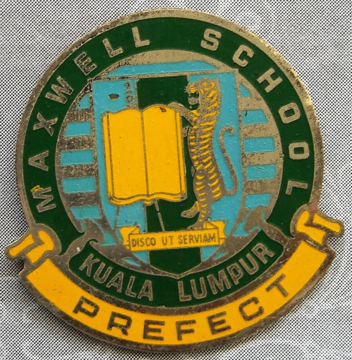 Lencana Ketua Pelajar